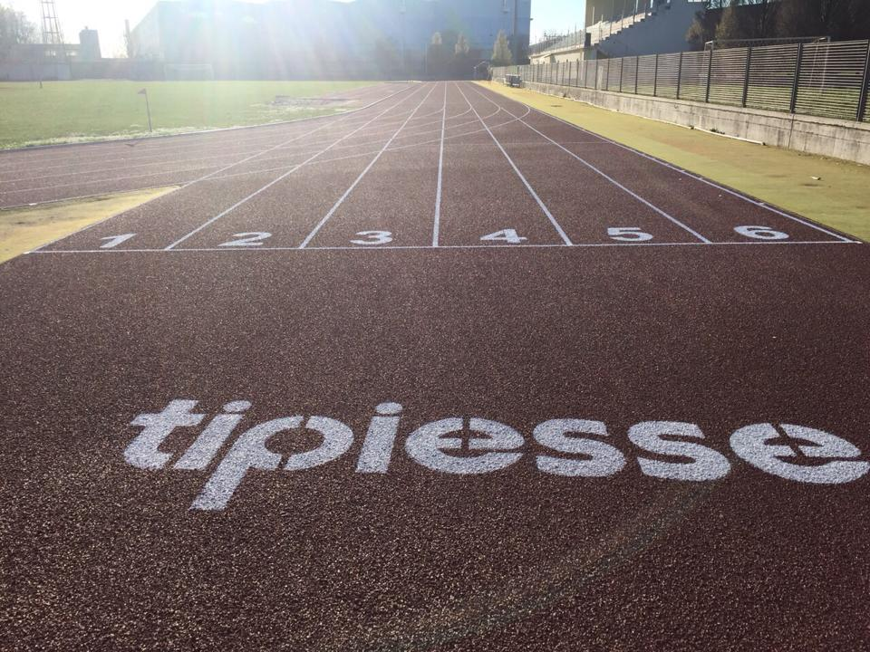 Pista atletica Chiari aprile 2015